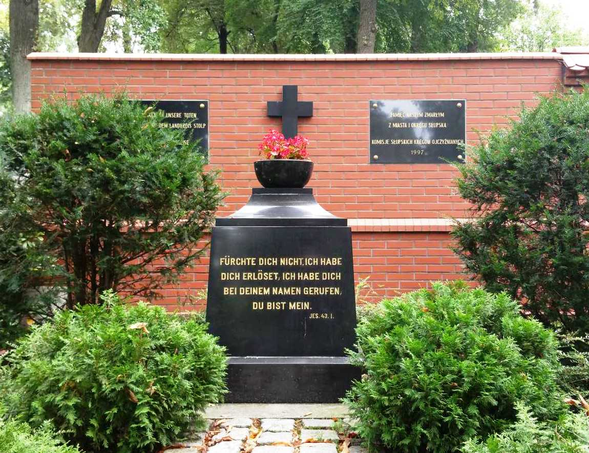 Gedenkstätte für die zwischen 1945 und 1947 umgekommenen Deutschen der Stadt und des Landkreises Stolp